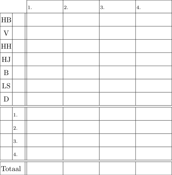 Het scoreformulier dat wordt gebruikt bij het kaartspel Bonken.